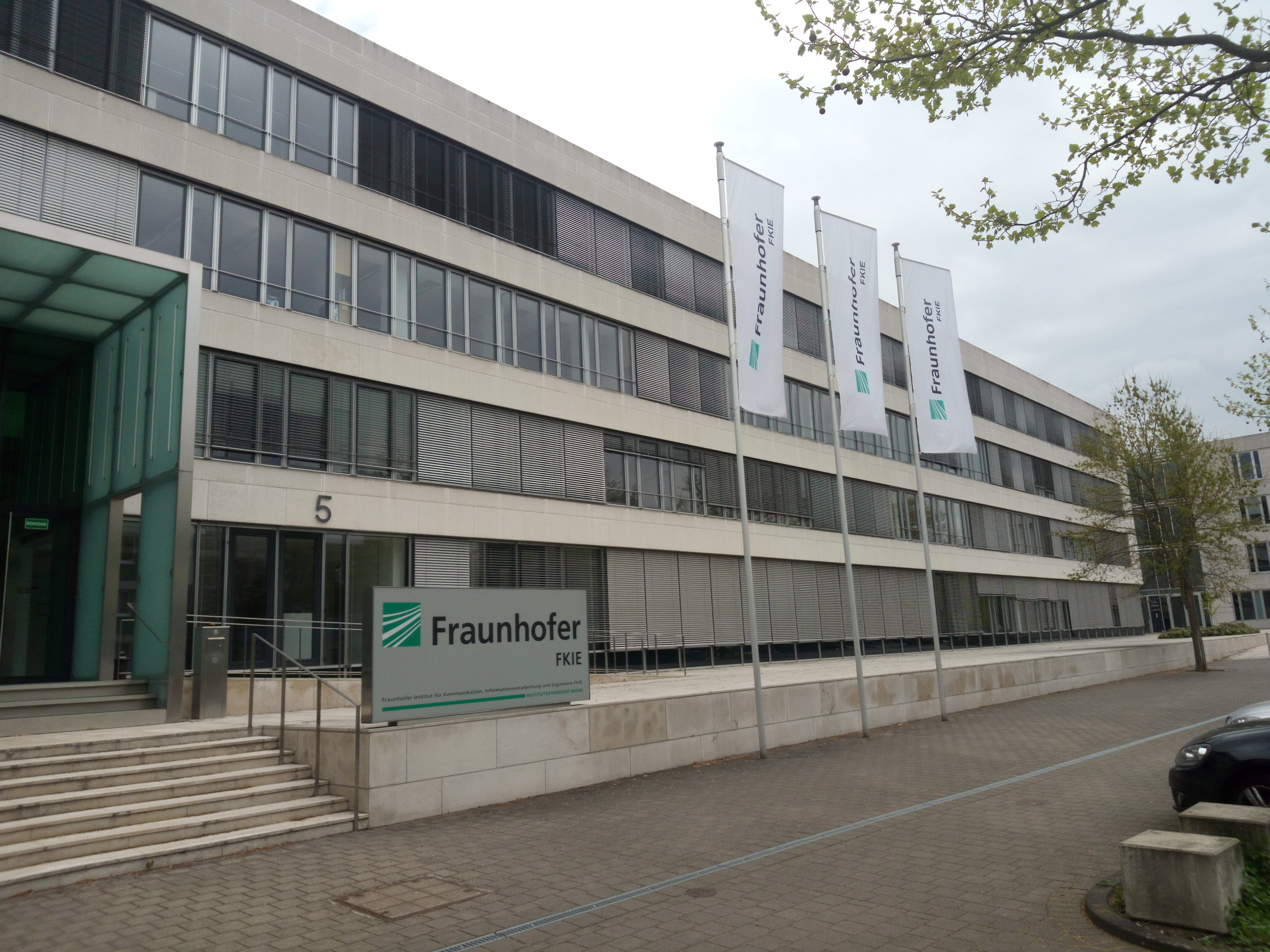 Fraunhofer FKIE Zweigstelle in Bonn-Bad Godesberg, Zanderstr. 5